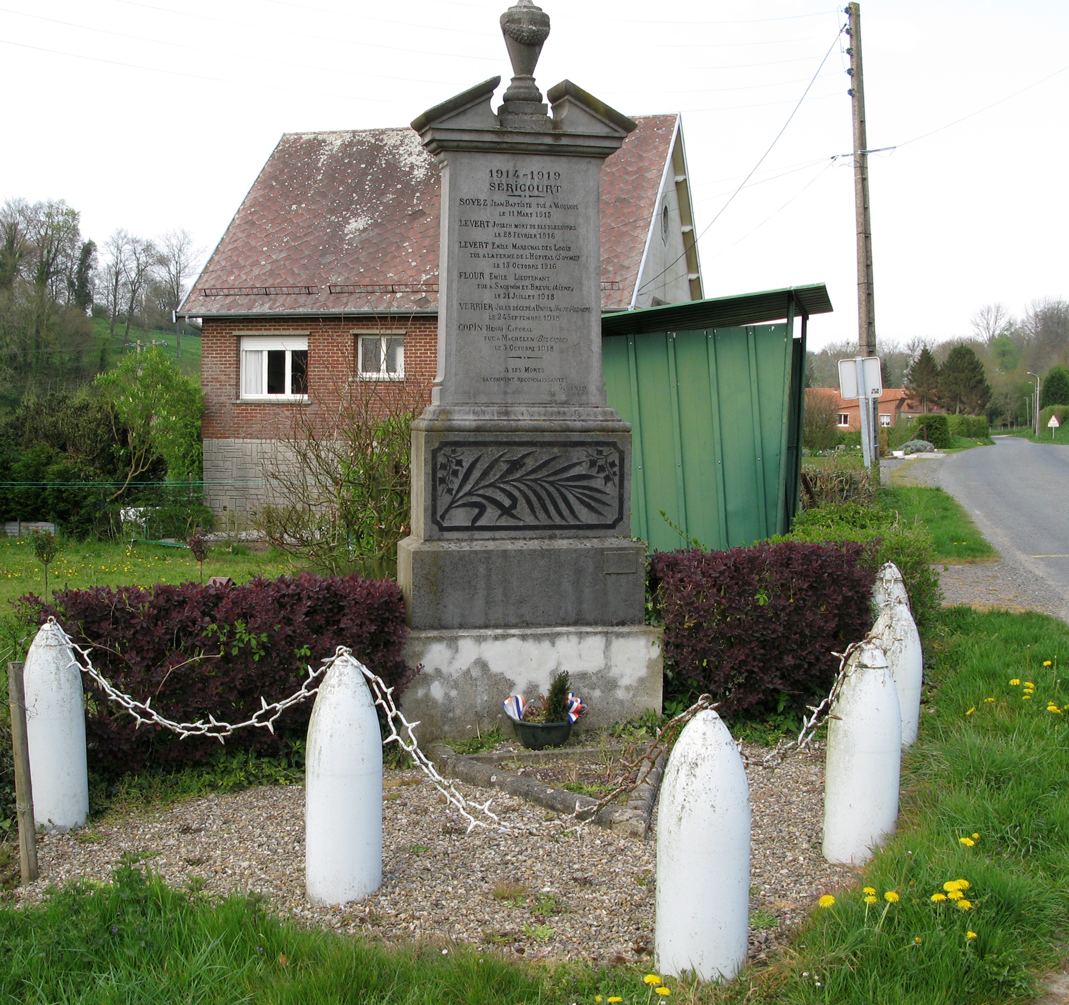 Séricourt (Pas-de-Calais, France) - Le monument-aux-morts. .